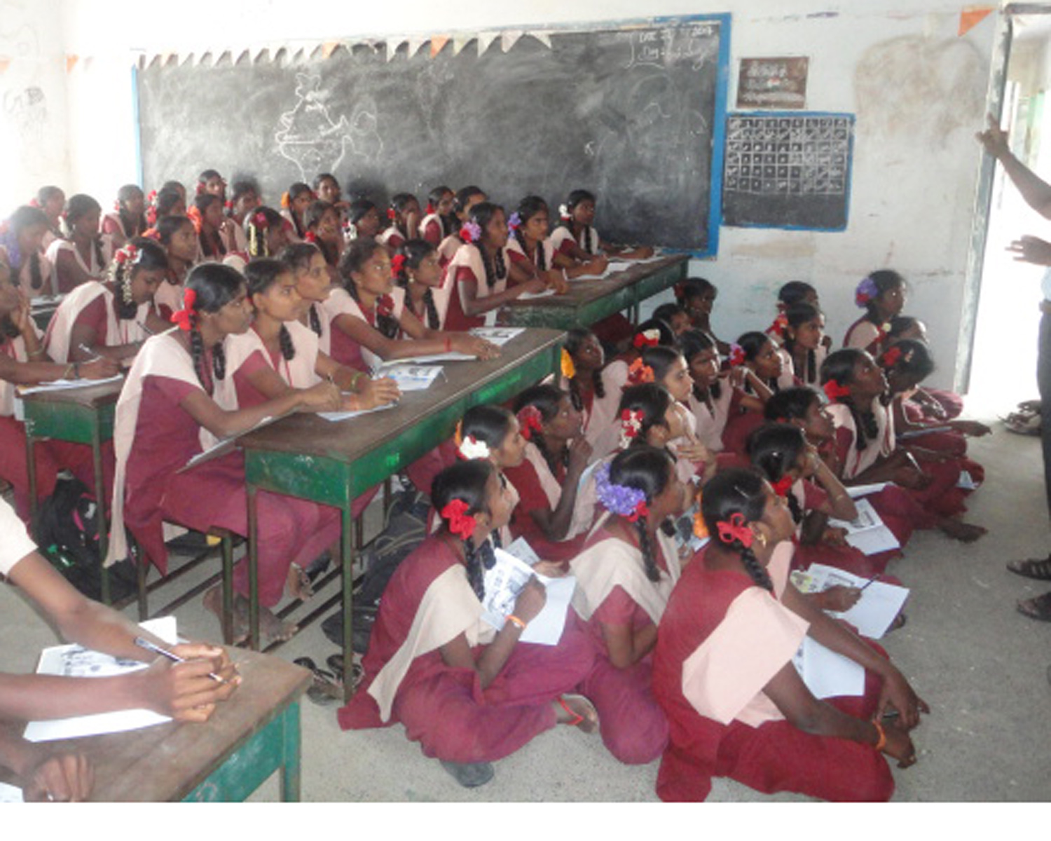 பெண் குழந்தைகள் பள்ளியில் படிக்கும் படம்